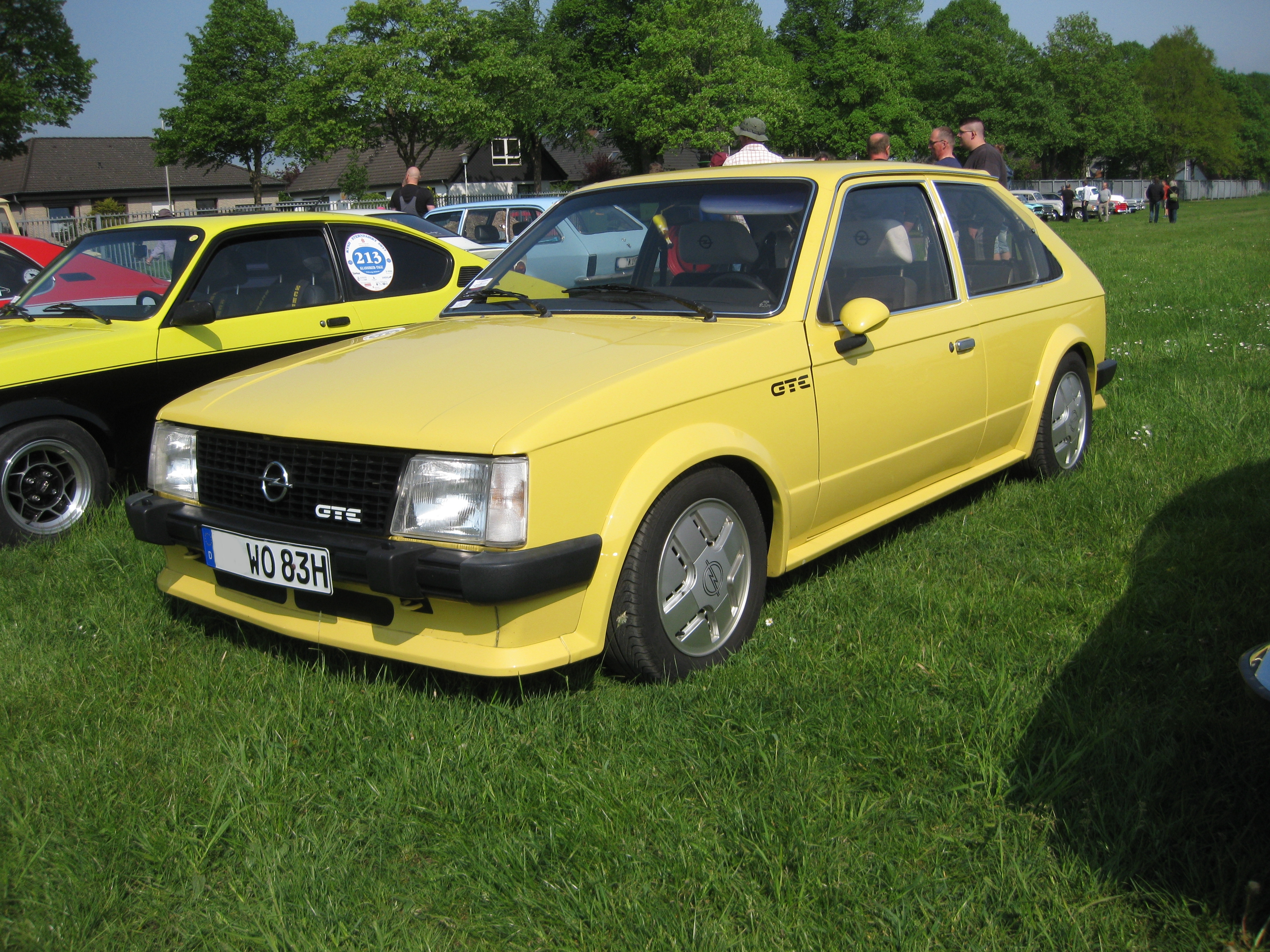 Opel Kadett D GT/E Frontansicht